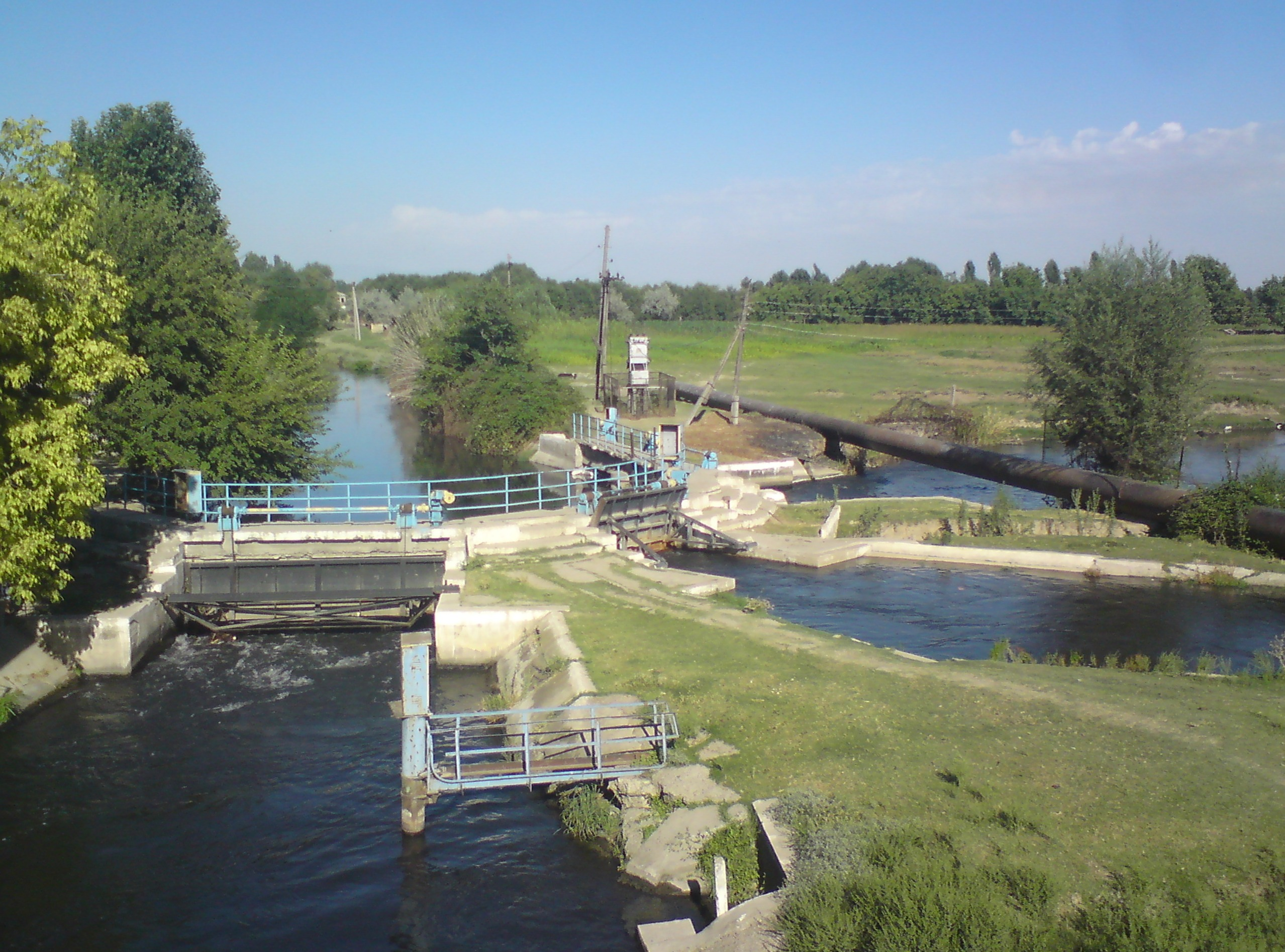 Водоотделитель на канале Салар (посёлок Уртаал, Ташкентский вилоят). Прямо после разделения - Каракульдук, далее - Ниязбаш, самый дальний канал - Карасу (может также рассматриваться как продолжение Салара)